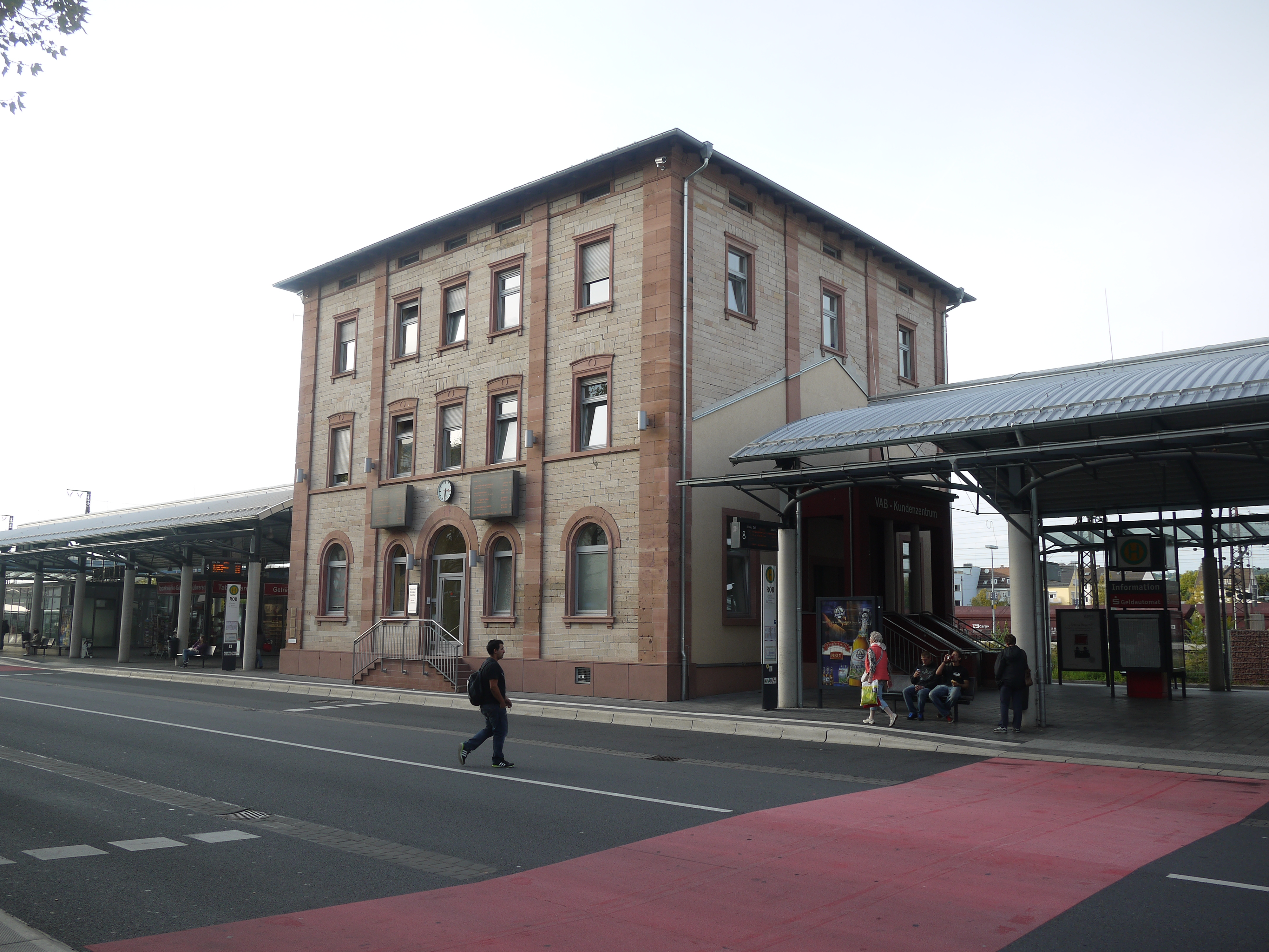 Ludwigstraße 8 in Aschaffenburg ehemls Güterabfertigung heute ROB (Regionaler Omnibus Bahnhof)